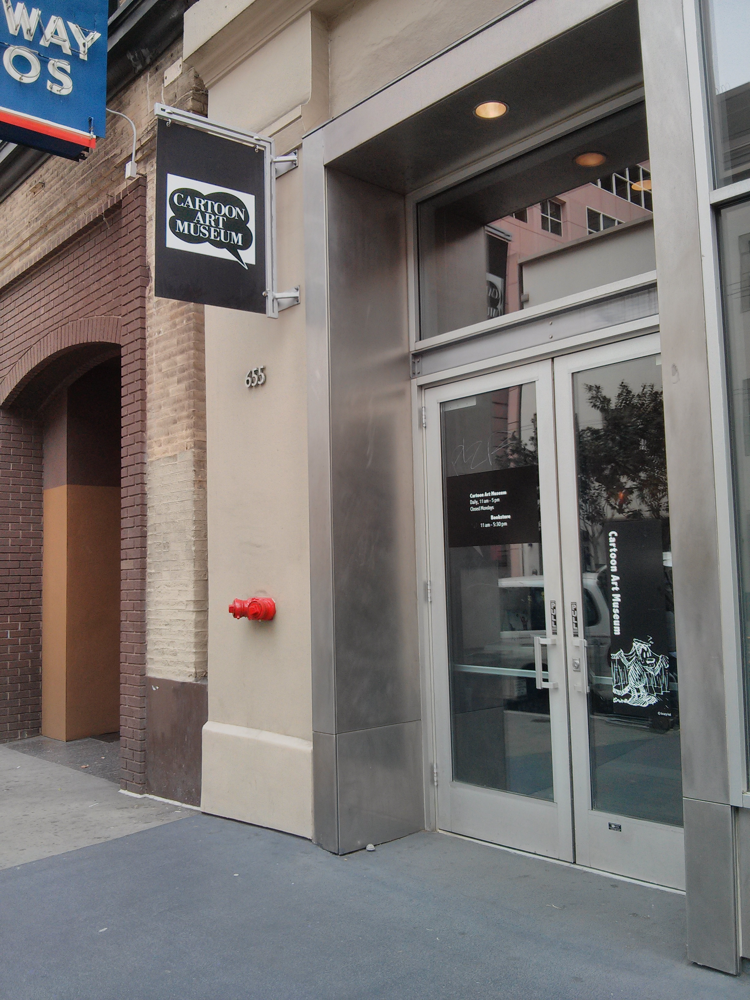 Front door of Cartoon Art Museum